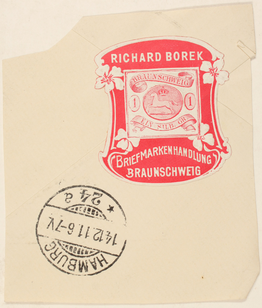 Siegelmarke auf der Rückseite eines nur als Ausschnitt erhaltenen Briefumschlags. Die Marke ist rotgrundig. Die Ränder sind in der Art des Jugendstils ornamental verziert. In der Mitte ist eine Briefmarke dargestellt, die im Zentrum ein Pferd in einem Med